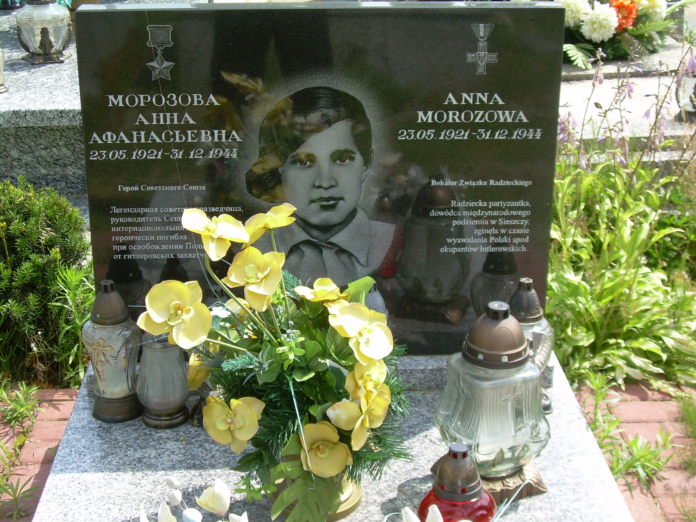 Gradzanowo Kościelne ,mogiła Ani Morozowej - poległej w 1944 radiotelegrafistki z grupy dywersyjno - zwiadowczej powstańców polskich i radzieckich